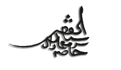 Mimar Sinan veya Koca Mi'mâr Sinân Âğâ'nın bilinen, eserlerinde kullandığı; günümüze kadar gelmiş kişisel imzası.